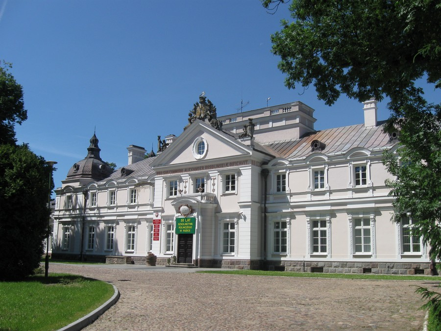 pałac Rudka